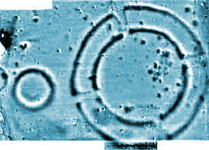 Magnetogramm der Kreisgabenanlage in Kleinrötz.